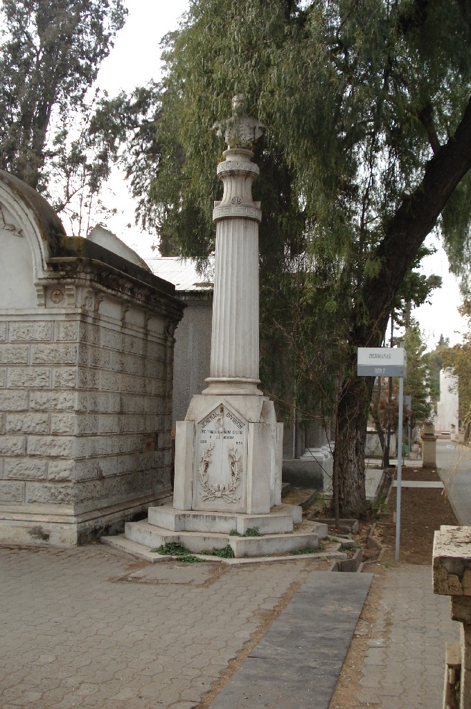 Tumba de José Francisco Gana en el Cementerio General de Santiago de Chile.